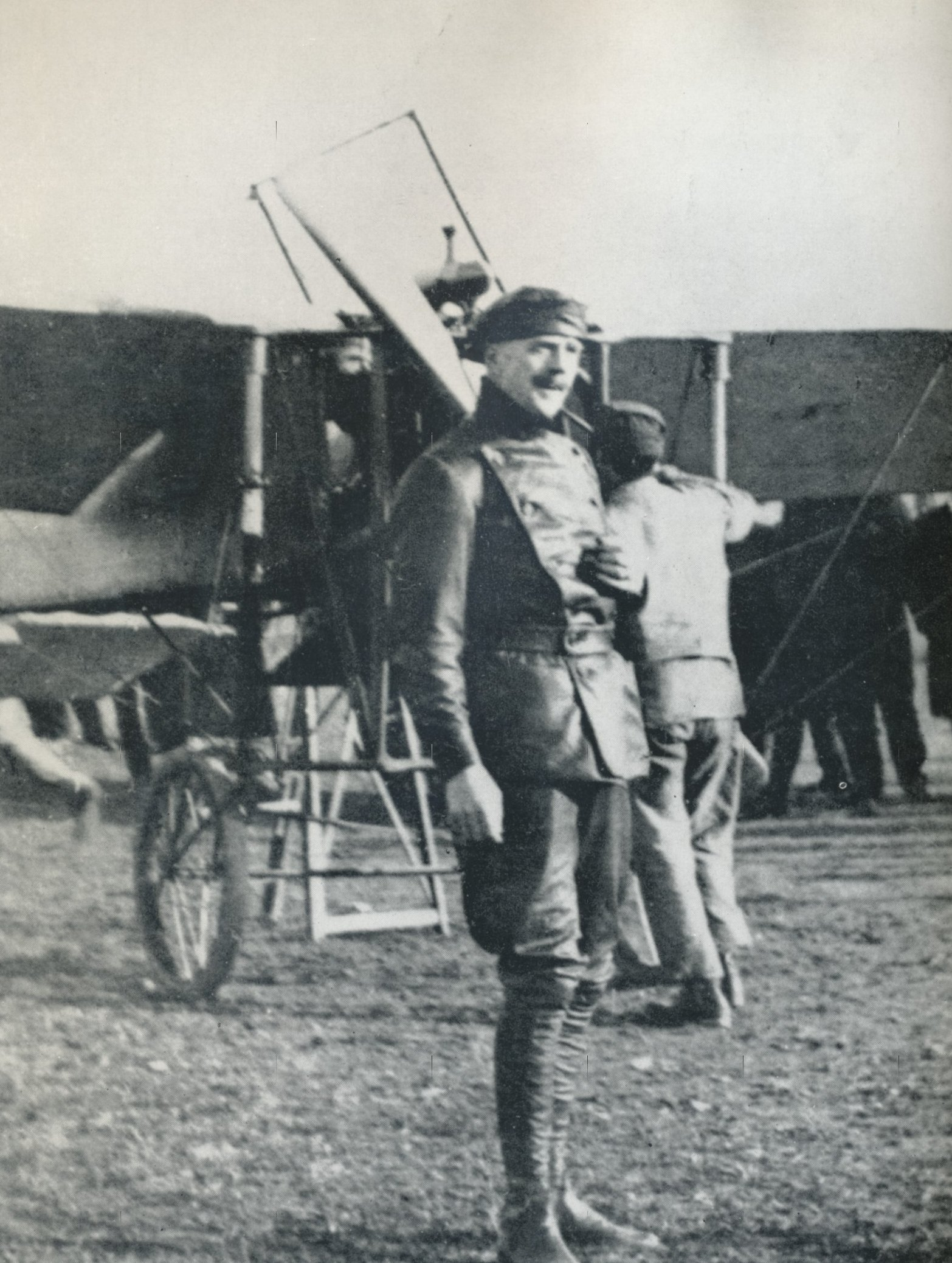 Baron Cederstrøm, Etterstad, Kristiania, Norway, 1910